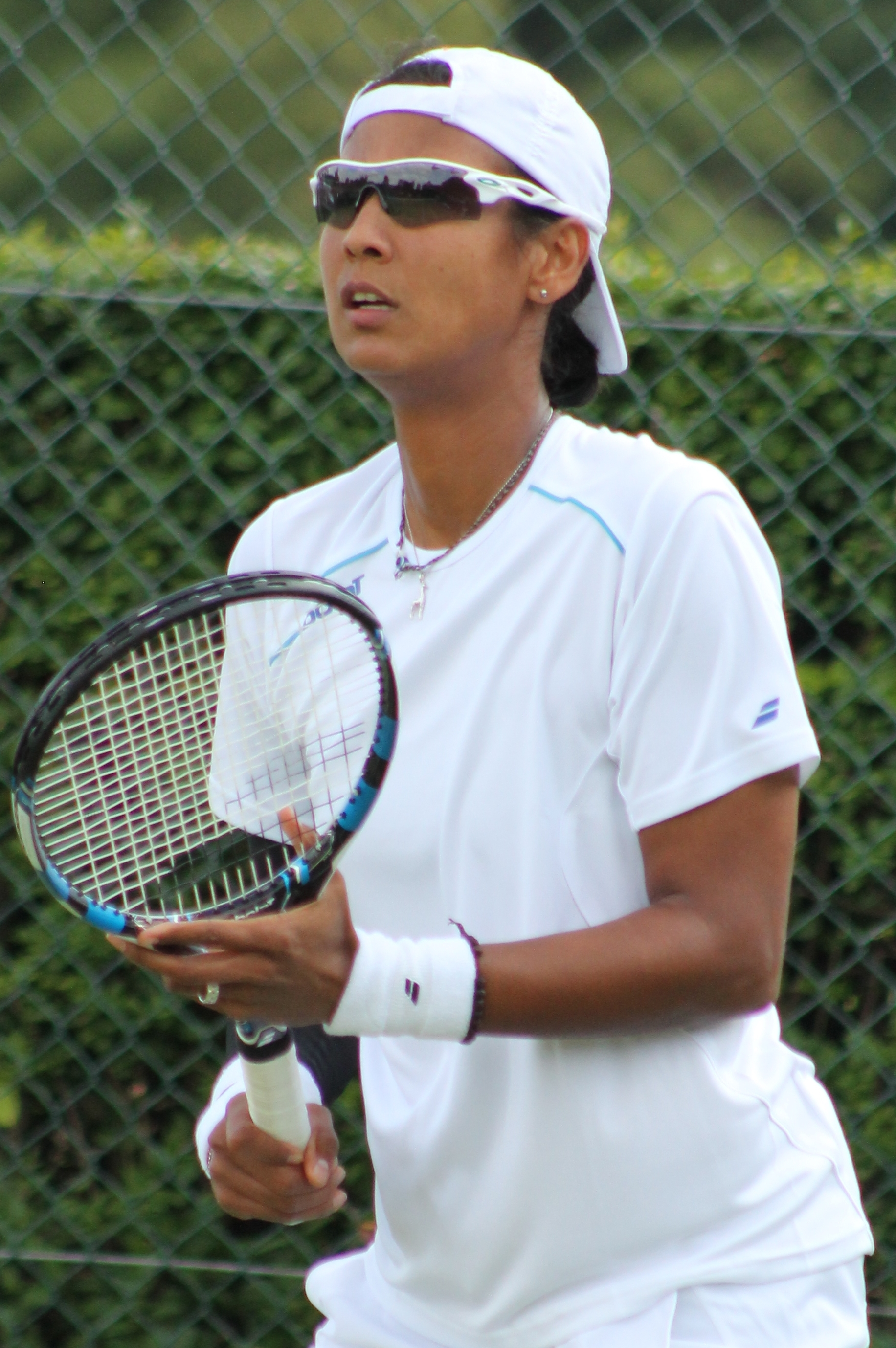 Amanmuradova WMQ15